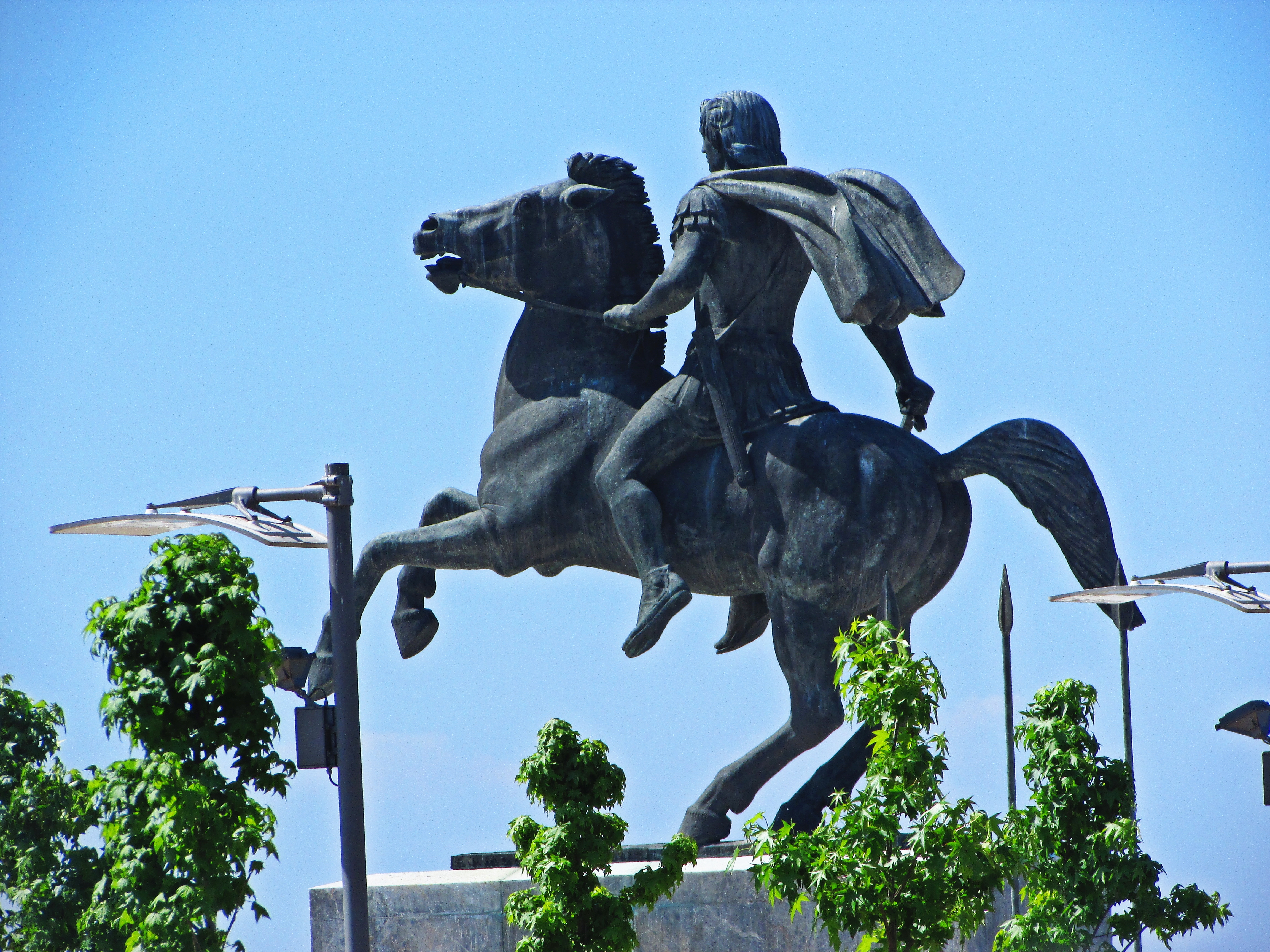 In Thessaloniki